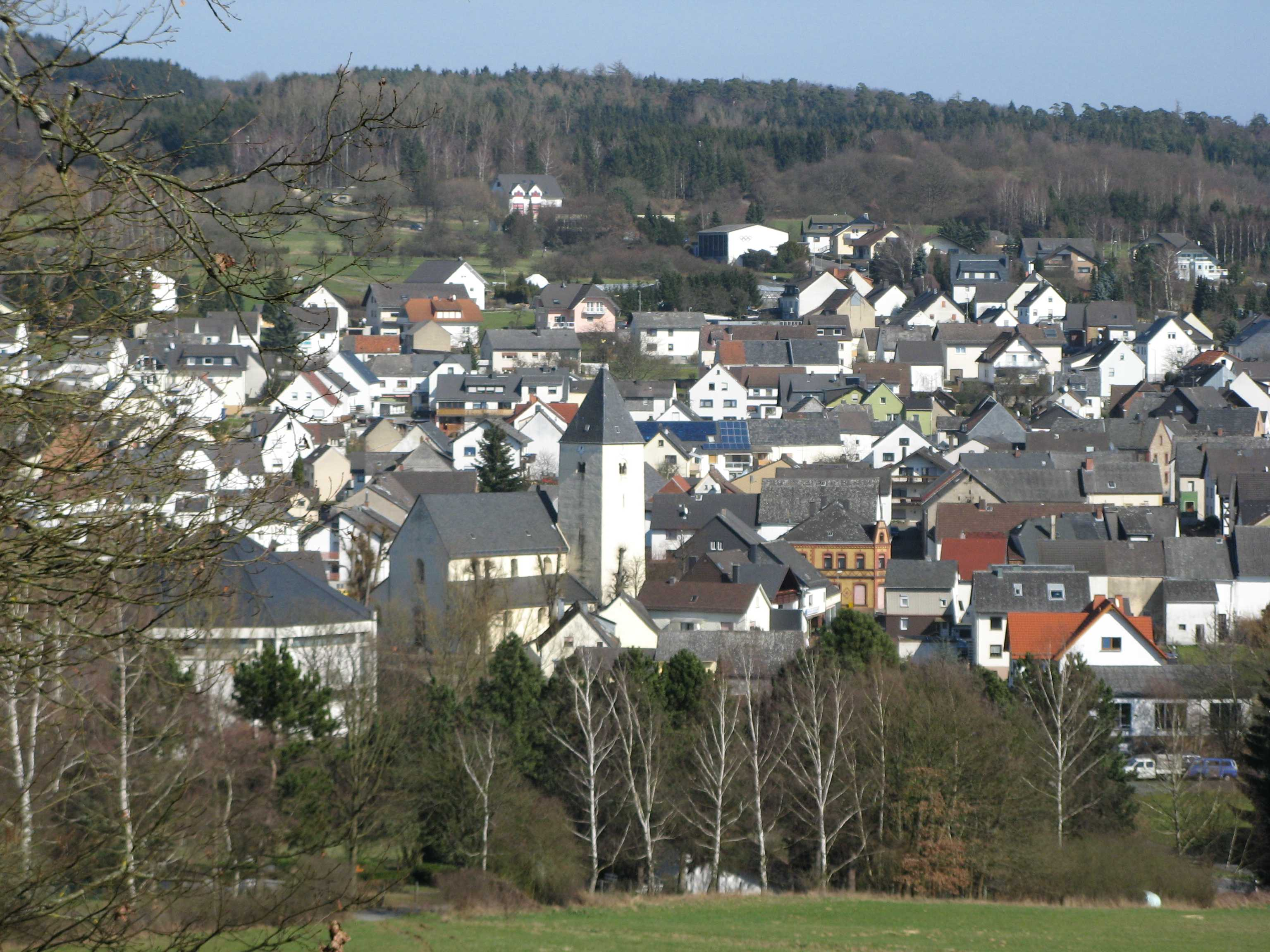 Panorama Lahr (Waldbrunn, Hesse, Germany)